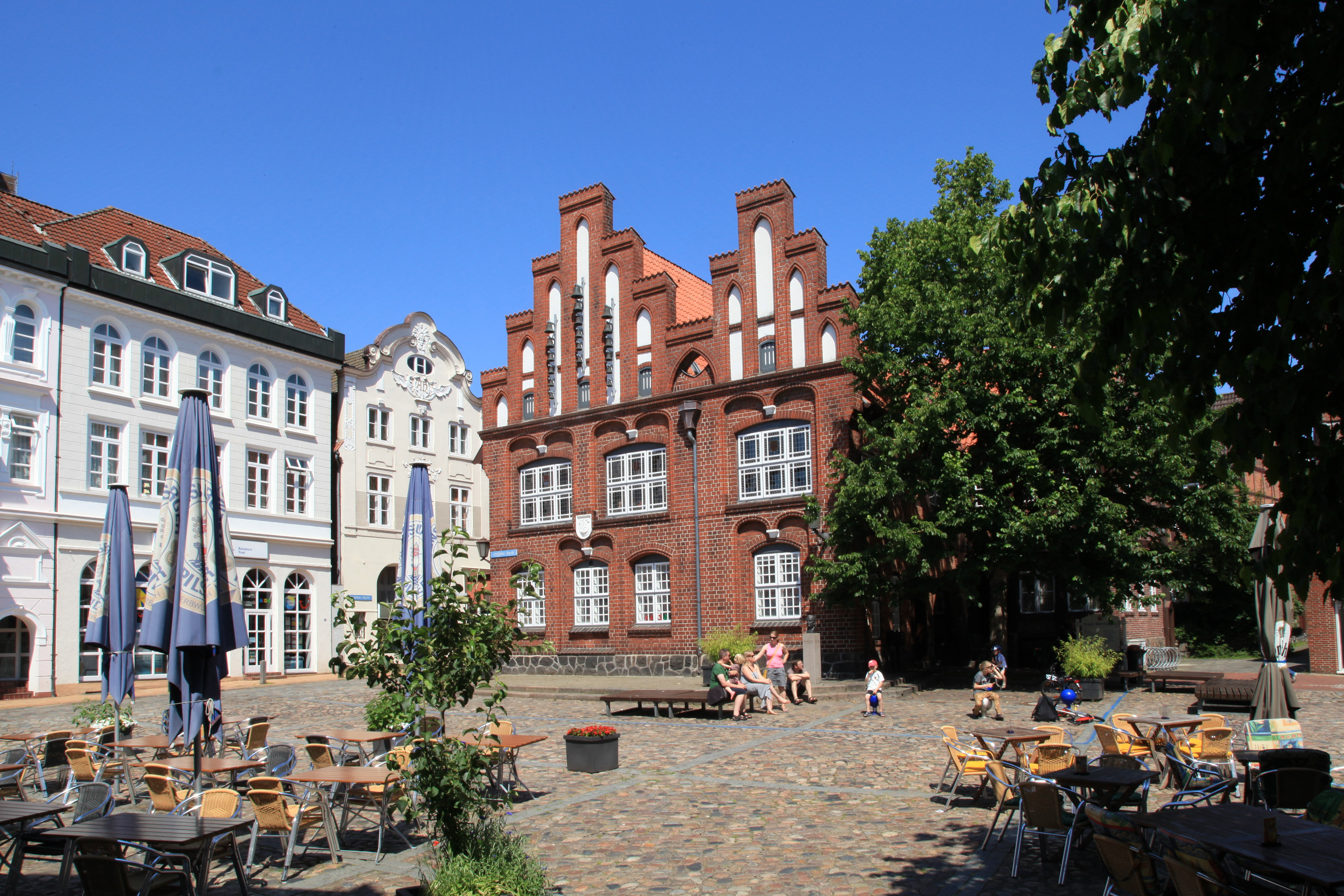 Mühlenstraße, Altstädter Markt und Altes Rathaus in Rendsburg